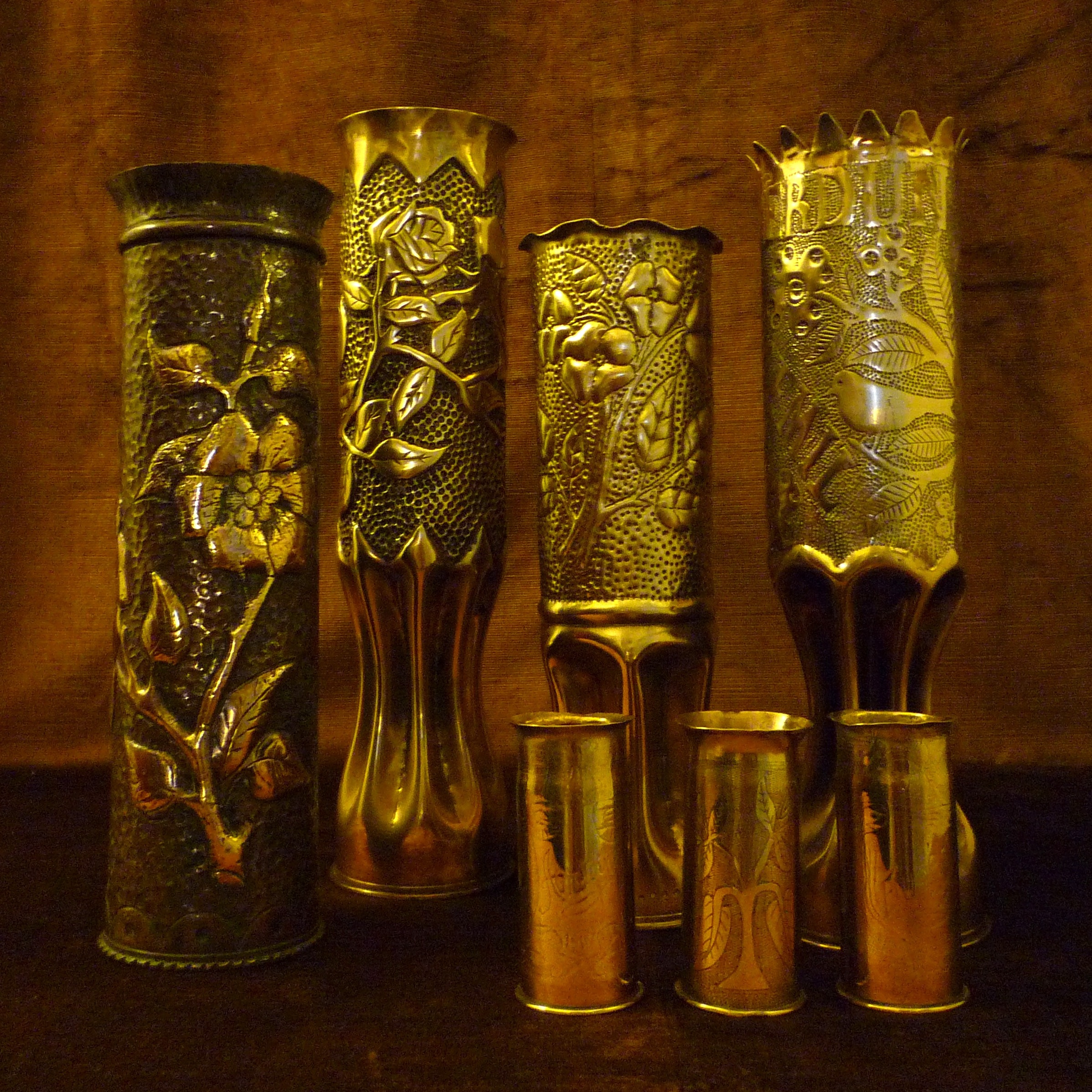 Artisanat de tranchée, douille de 75 mm et de 37,85 guerre 1914-1918